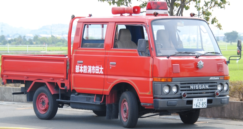 太田市消防本部の資材搬送車。太田市防災訓練にて撮影。